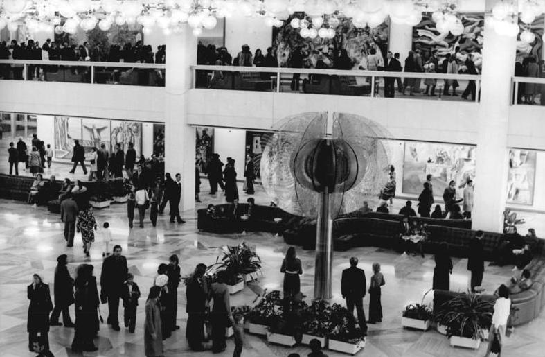 ADN-ZB Kohls 25.4.1976 Berlin: Palast der Republik öffnete seine Pforten- Mehr als 80 000 Besucher, Einwohner der Hauptstadt und ihre Gäste, nutzten den ersten Sonntag nach Eröffnung des Palastes der Republik (25.4.76) zu einem ersten Rundgang. Unser Foto zeigt einen Blick in das Doppelfoyer, das mit 16 Gemälden prominenter Künstler der DDR geschmückt ist.